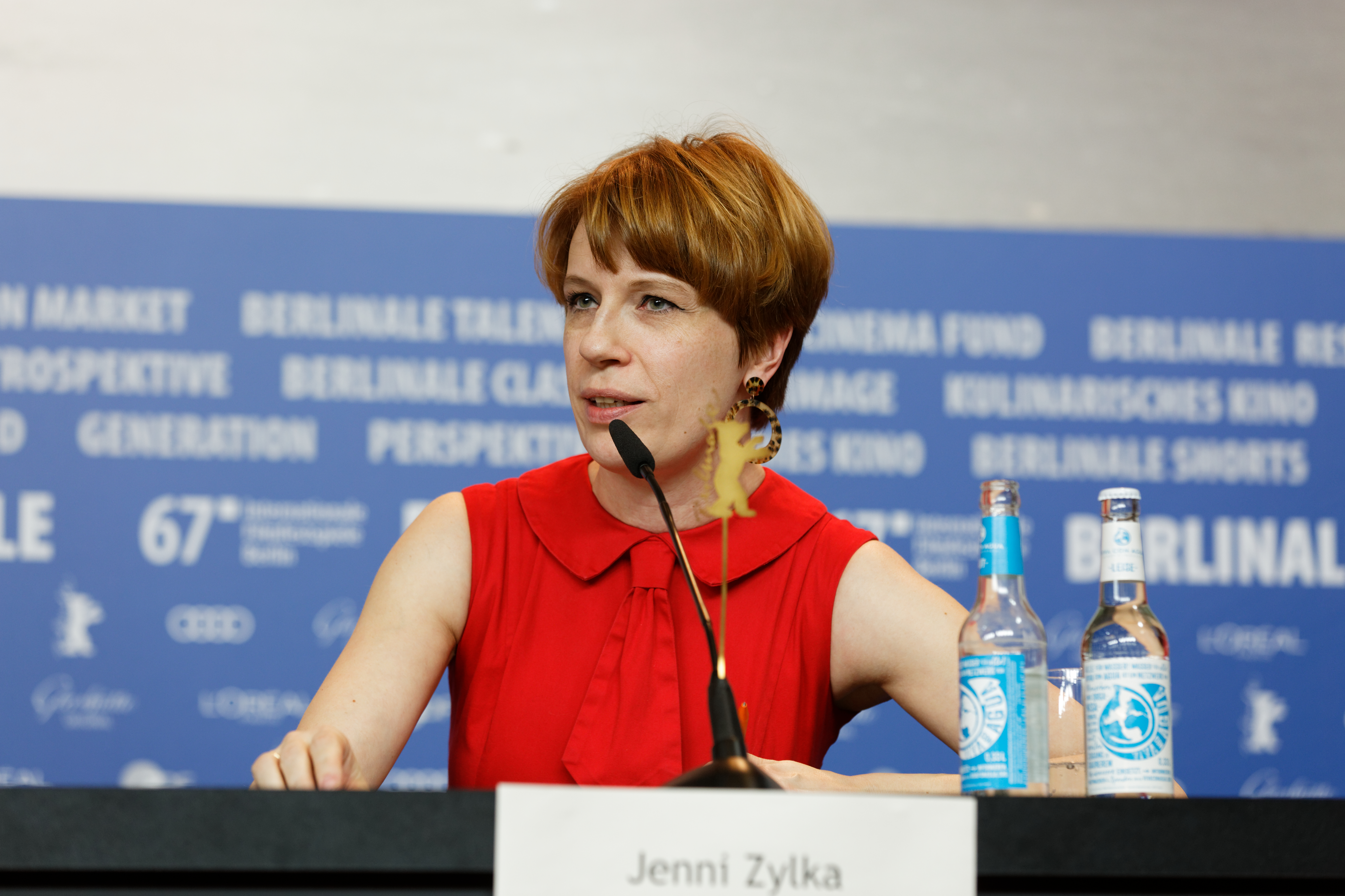 Jenni Zylka (Moderation) bei der Pressekonferenz zu Masaryk / A Prominent Patient bei der Berlinale 2017